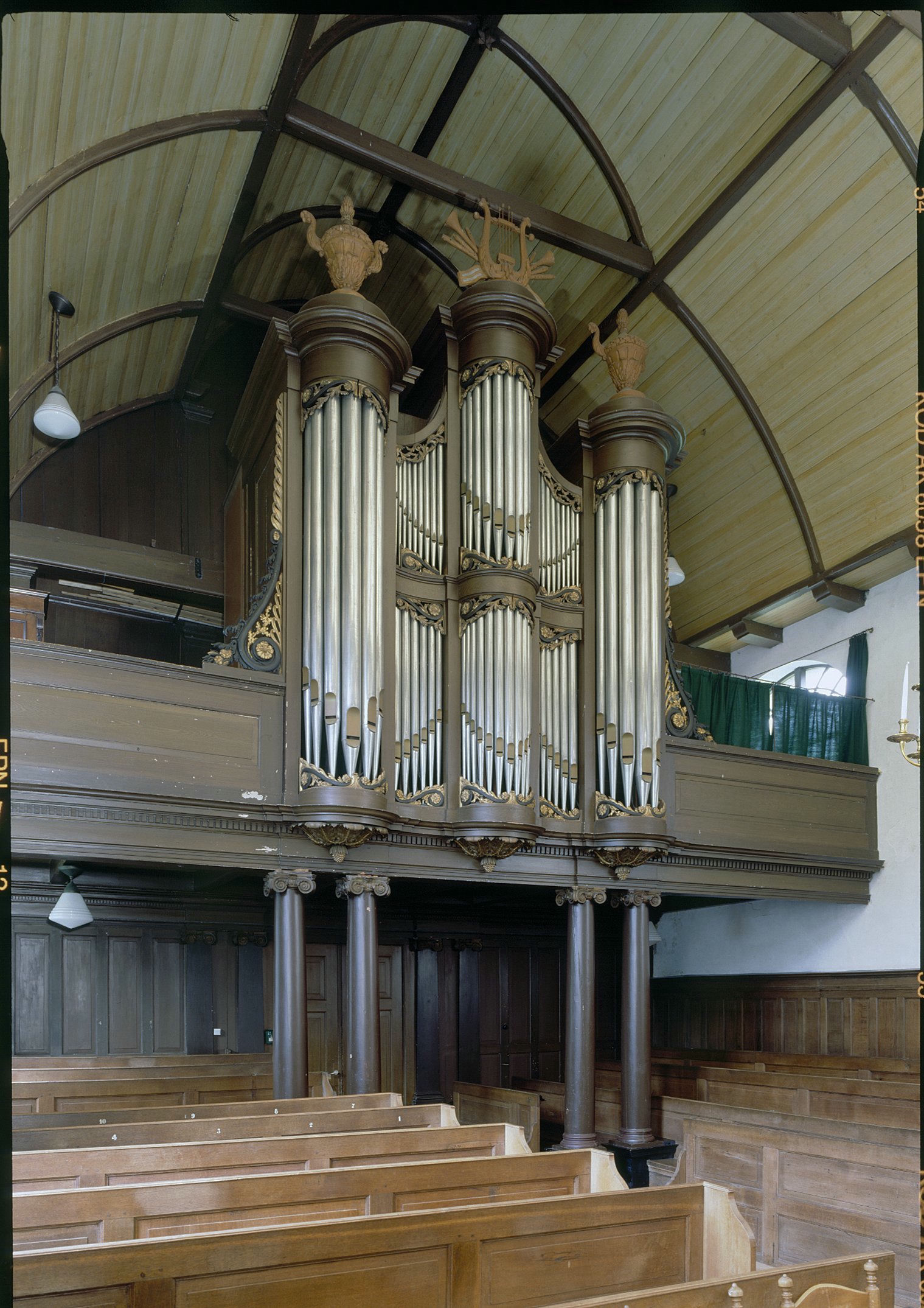 Nederlands Hervormde Kerk: Interieur, aanzicht orgel, orgelnummer 1588 (opmerking: Gefotografeerd voor Het Historische Orgel in Nederland 1840-1849)